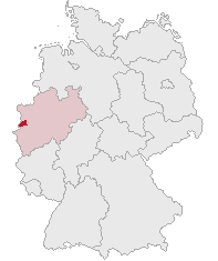 Kreis Viersen, North Rhine-Westphalia, Germany